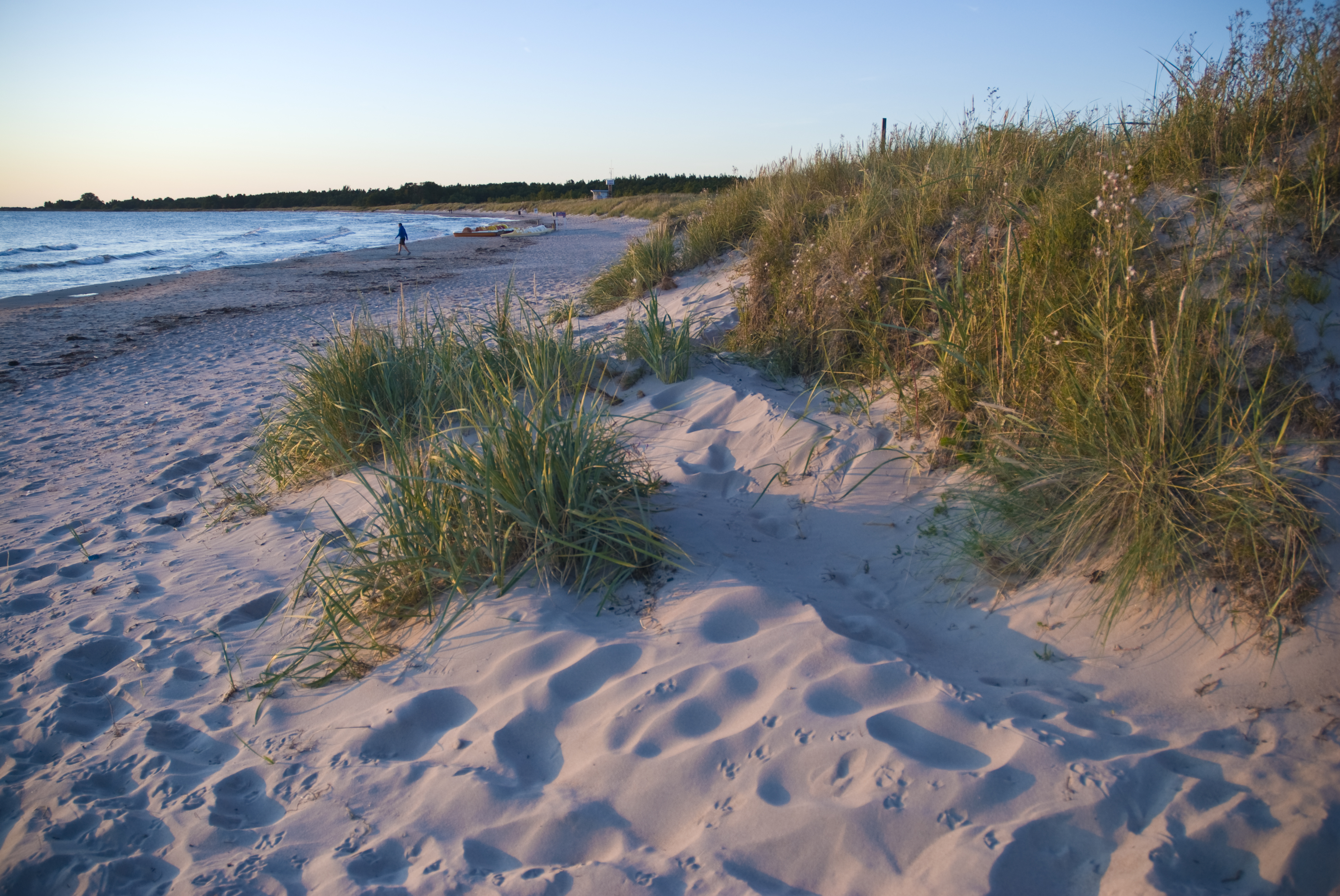 Gotland, Sweden